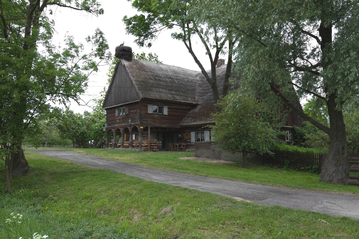 Chrystkowo, chata mennonitów z 1770 roku